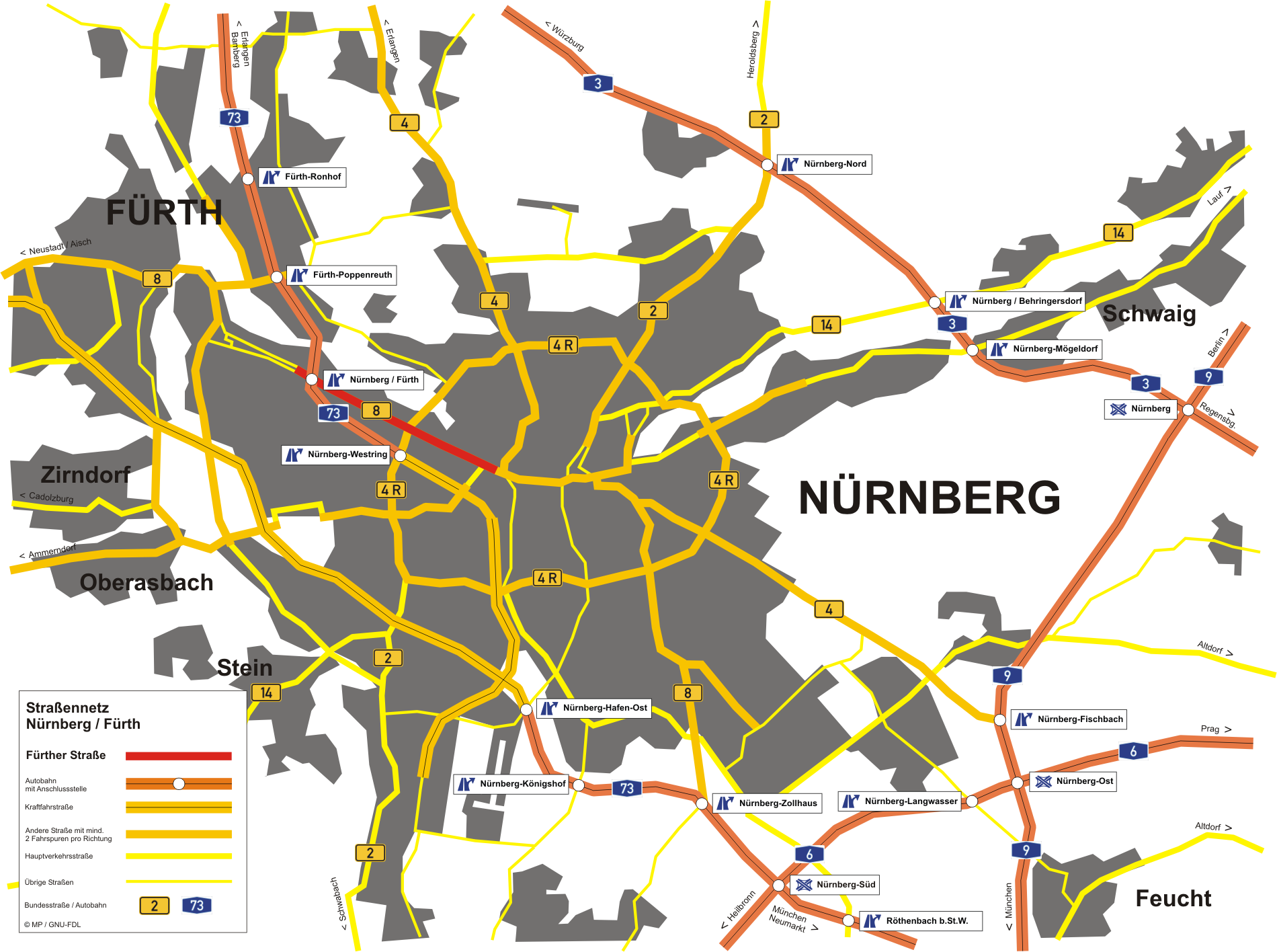 Straßennetz Nürnberg / Fürth / Stein mit hervorgehobener Fürther Straße